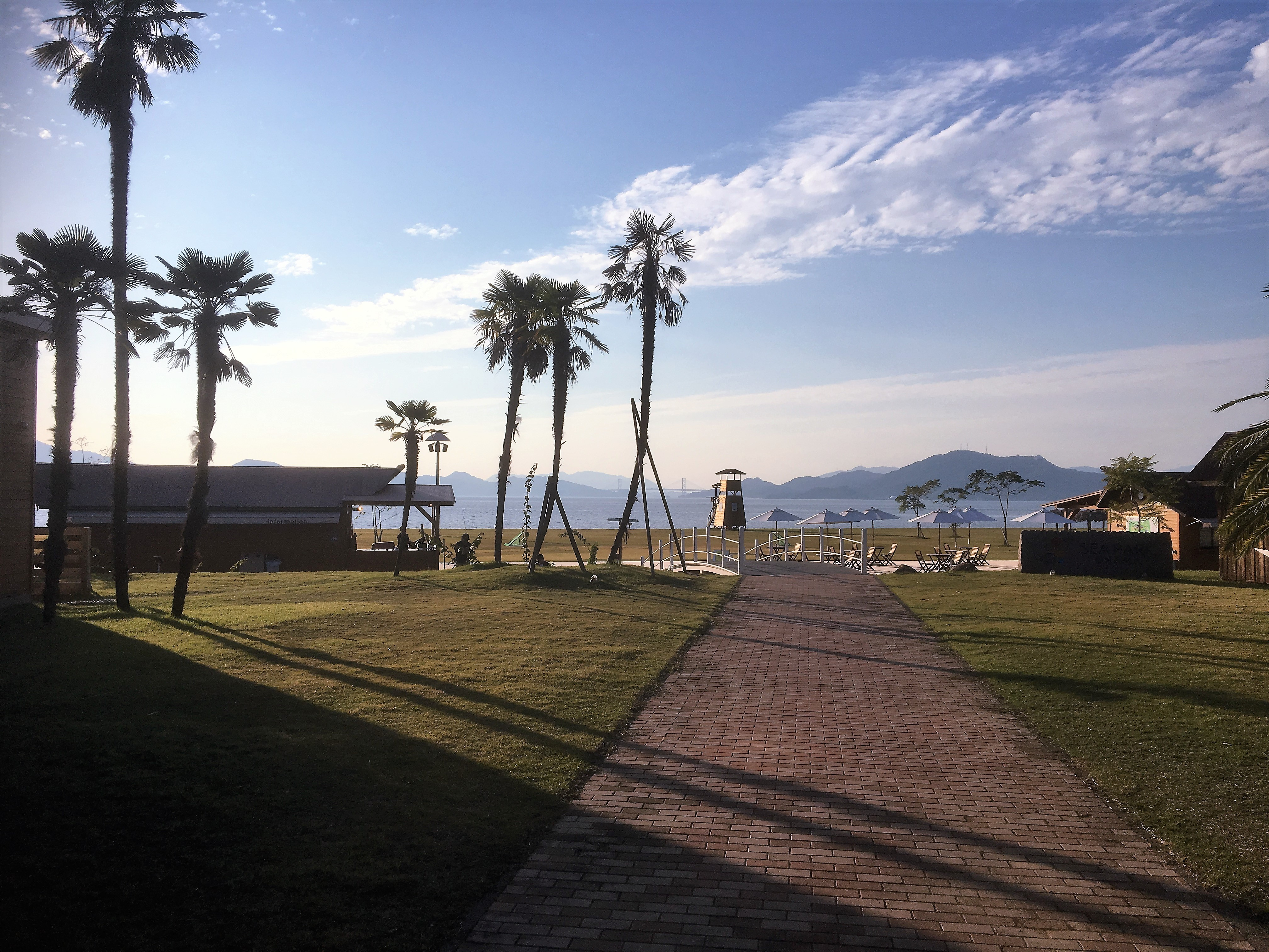 シーパーク大浜。広島県福山市横島の有料海水浴場。旧大日本帝国陸軍岩国陸軍燃料廠横島出張所跡。